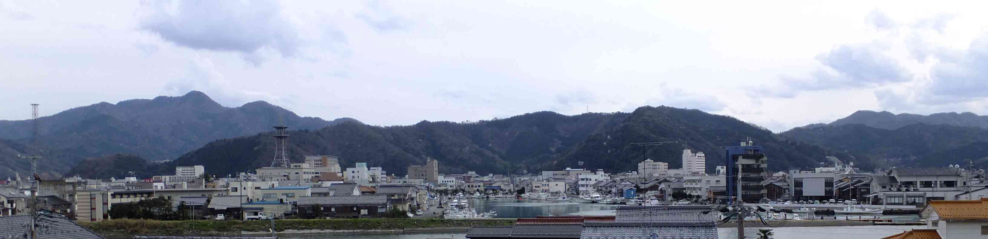 小浜市中心部風景